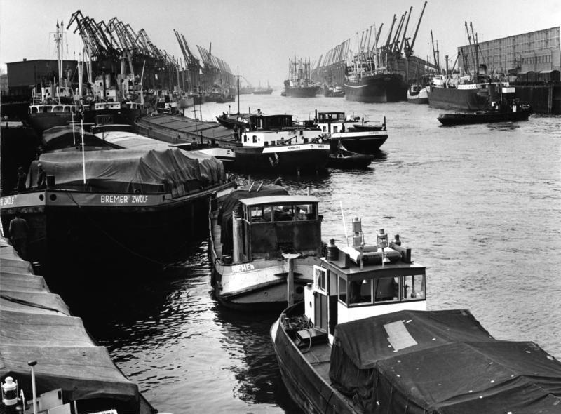 4.-8.10.1960 Im Bremer Freihafen --- "Bremen-Vahr" im Dateinamen ist irreführend